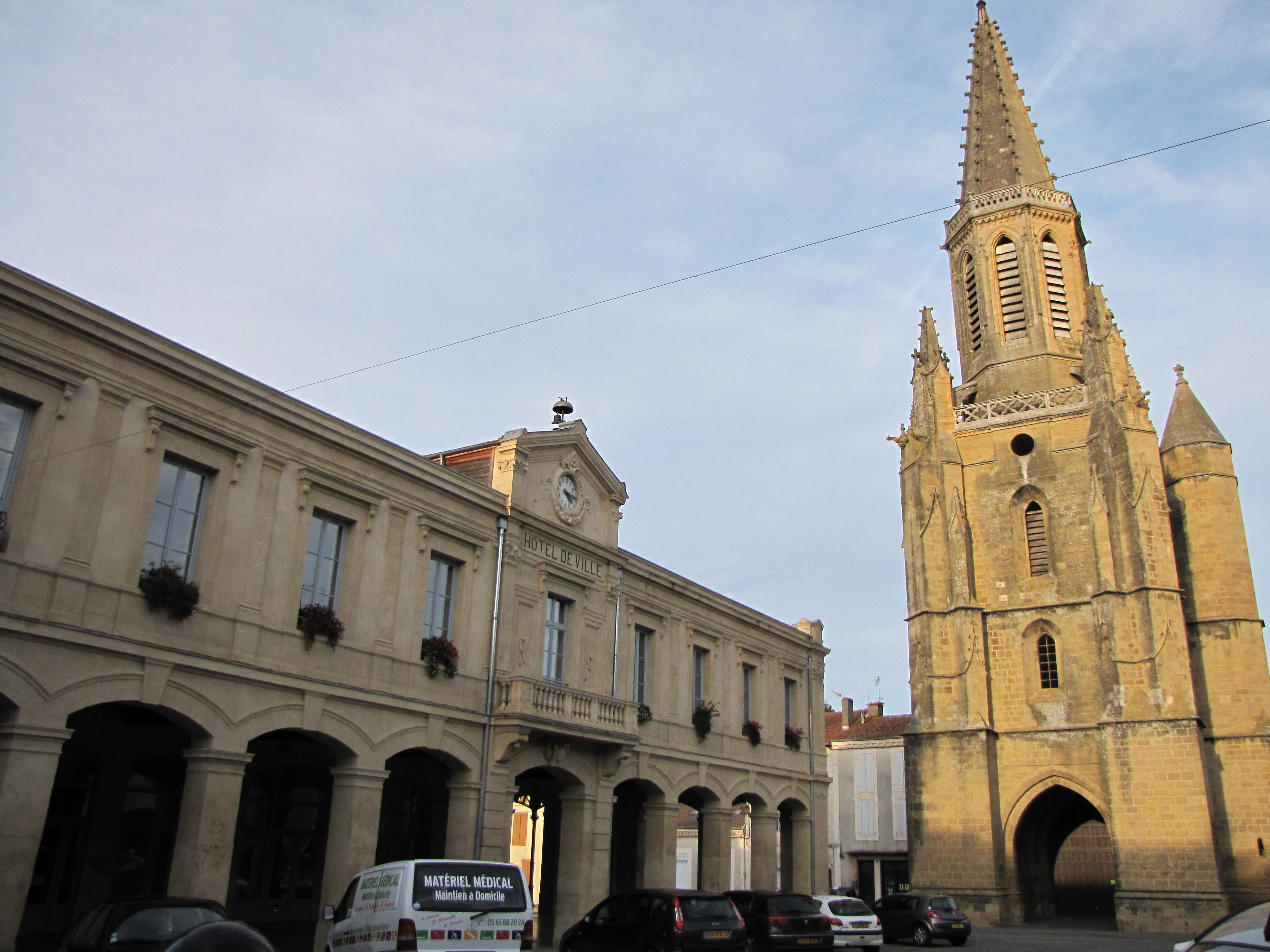 Mairie et église de Boulogne-sur-Gesse